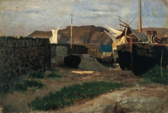 Barche a Sestri Levante